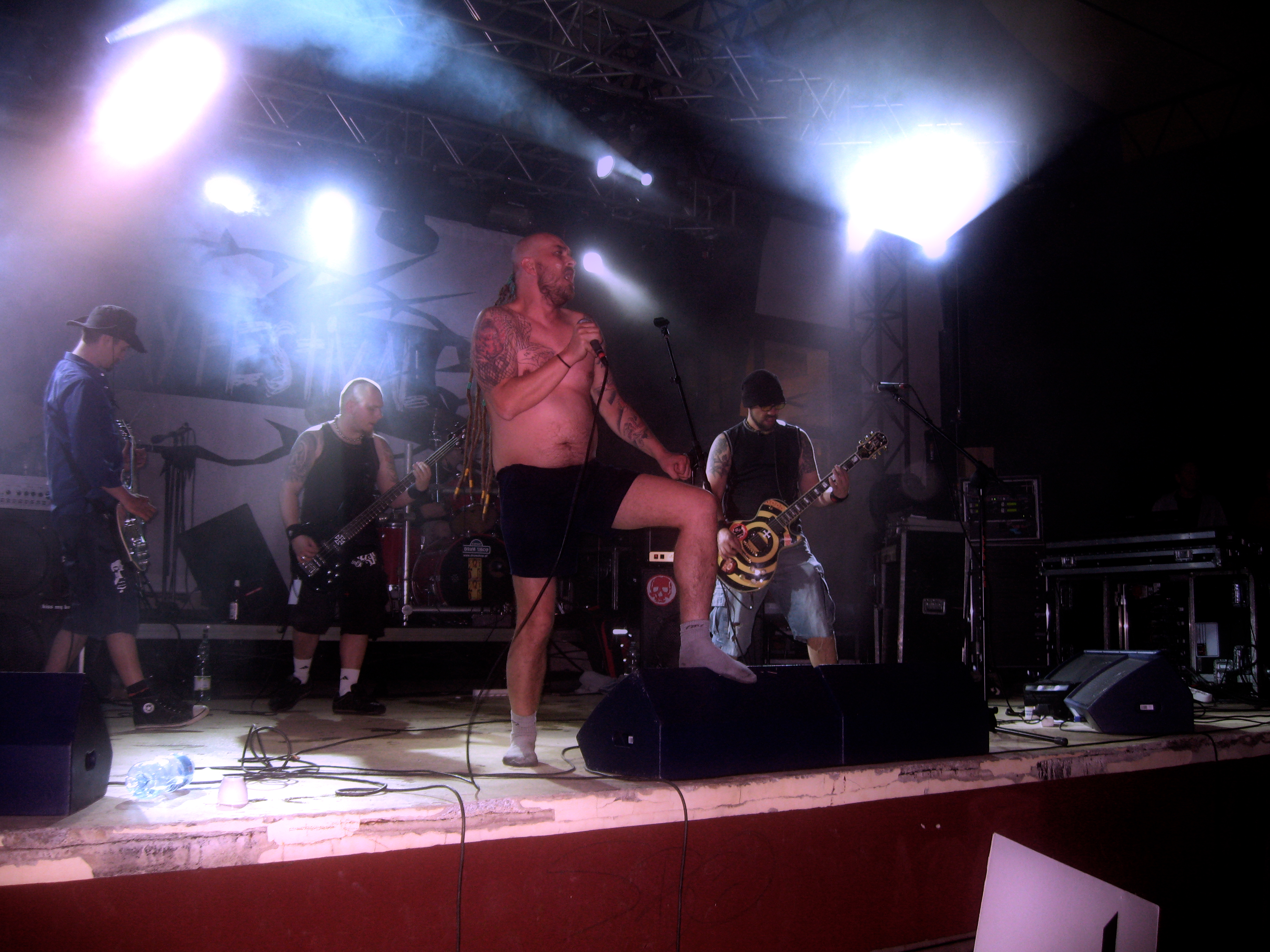 The thing rock may festival 2009